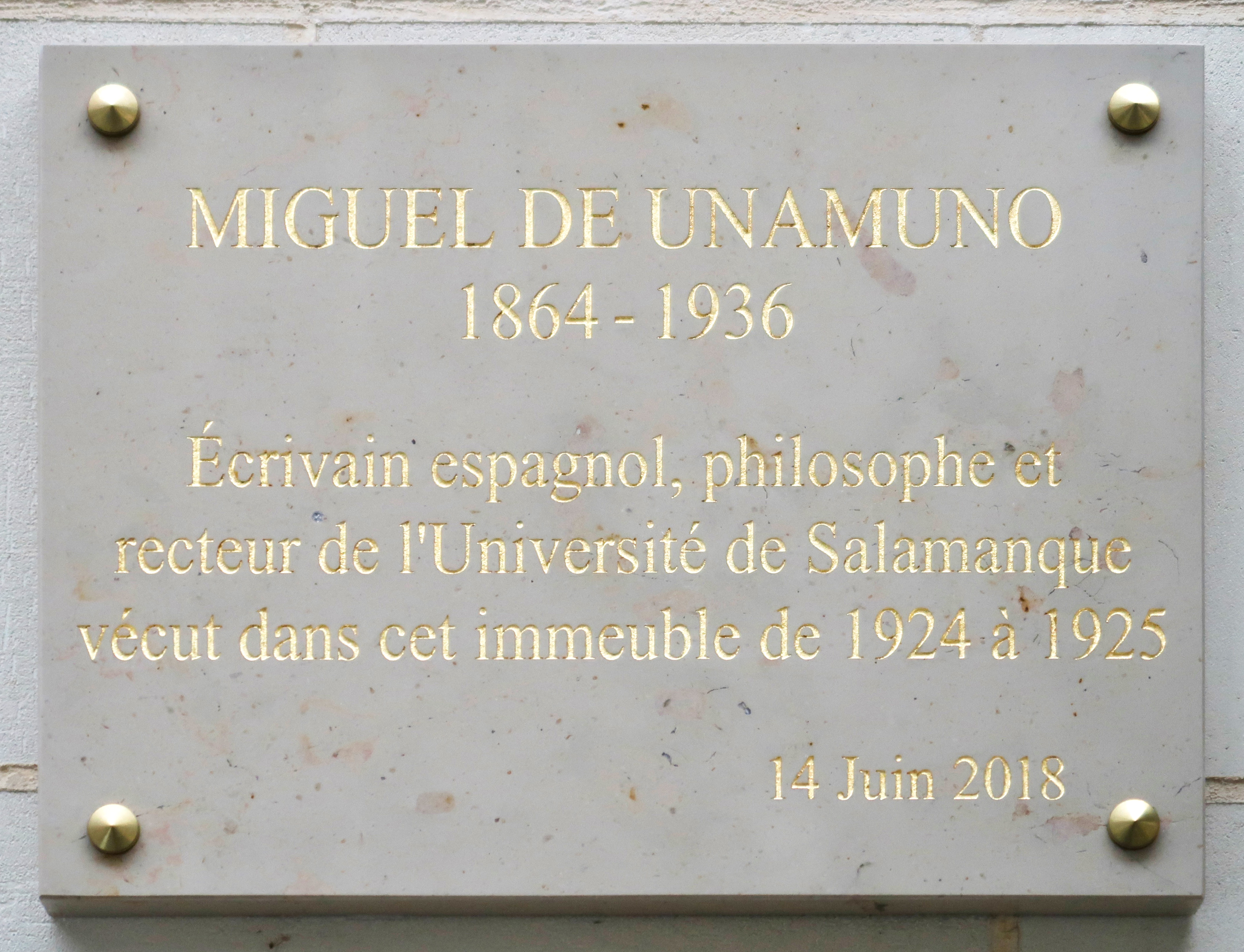 Plaque en hommage à Miguel de Unamuno, 2 rue La Pérouse (Paris, 16e).